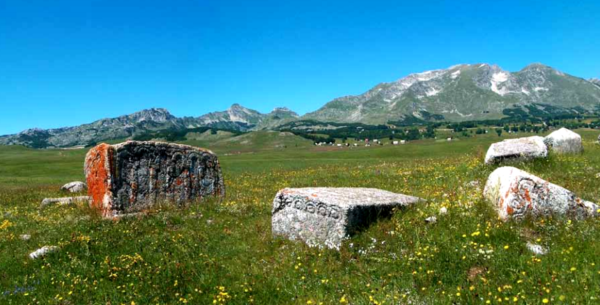 Srpski (latinica): Stećci, u Novakovićima (Riblje jezero) Žabljak.